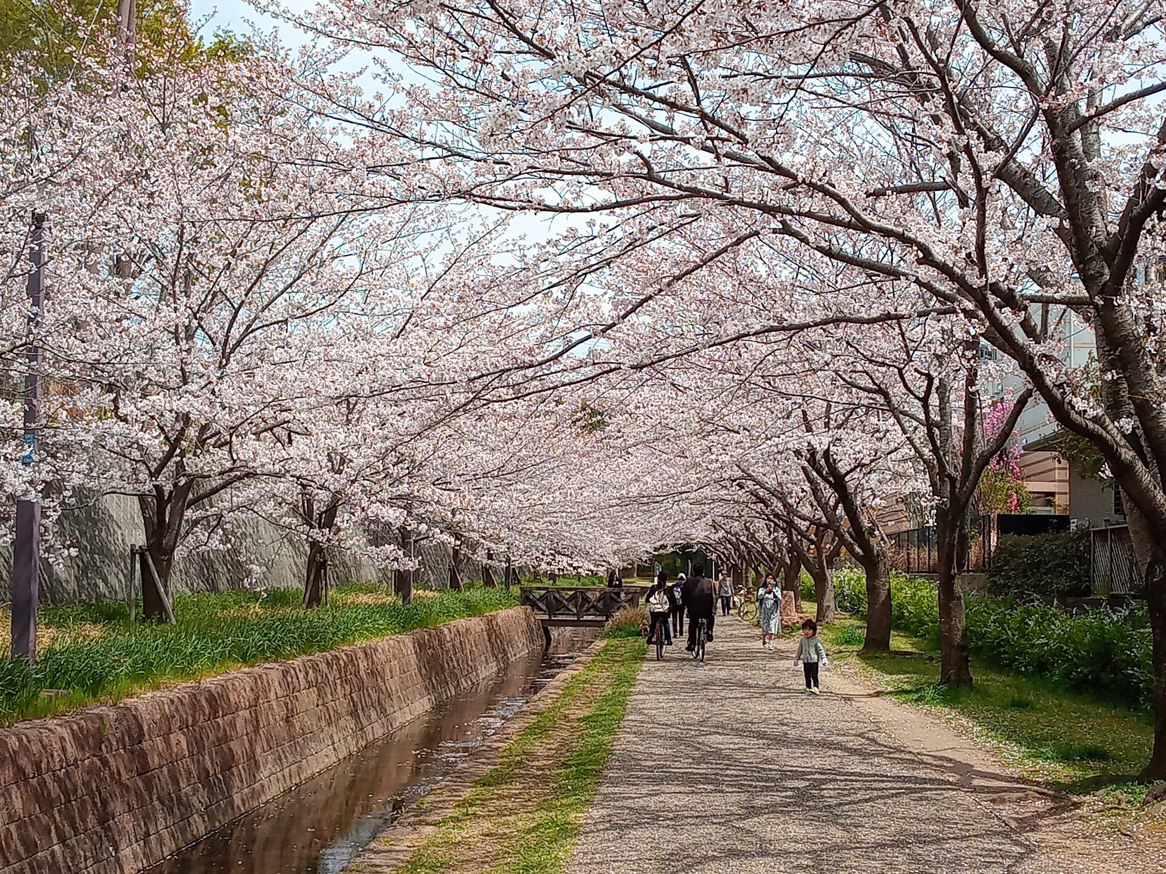 おゆみ野四季の道（遊歩道）の桜